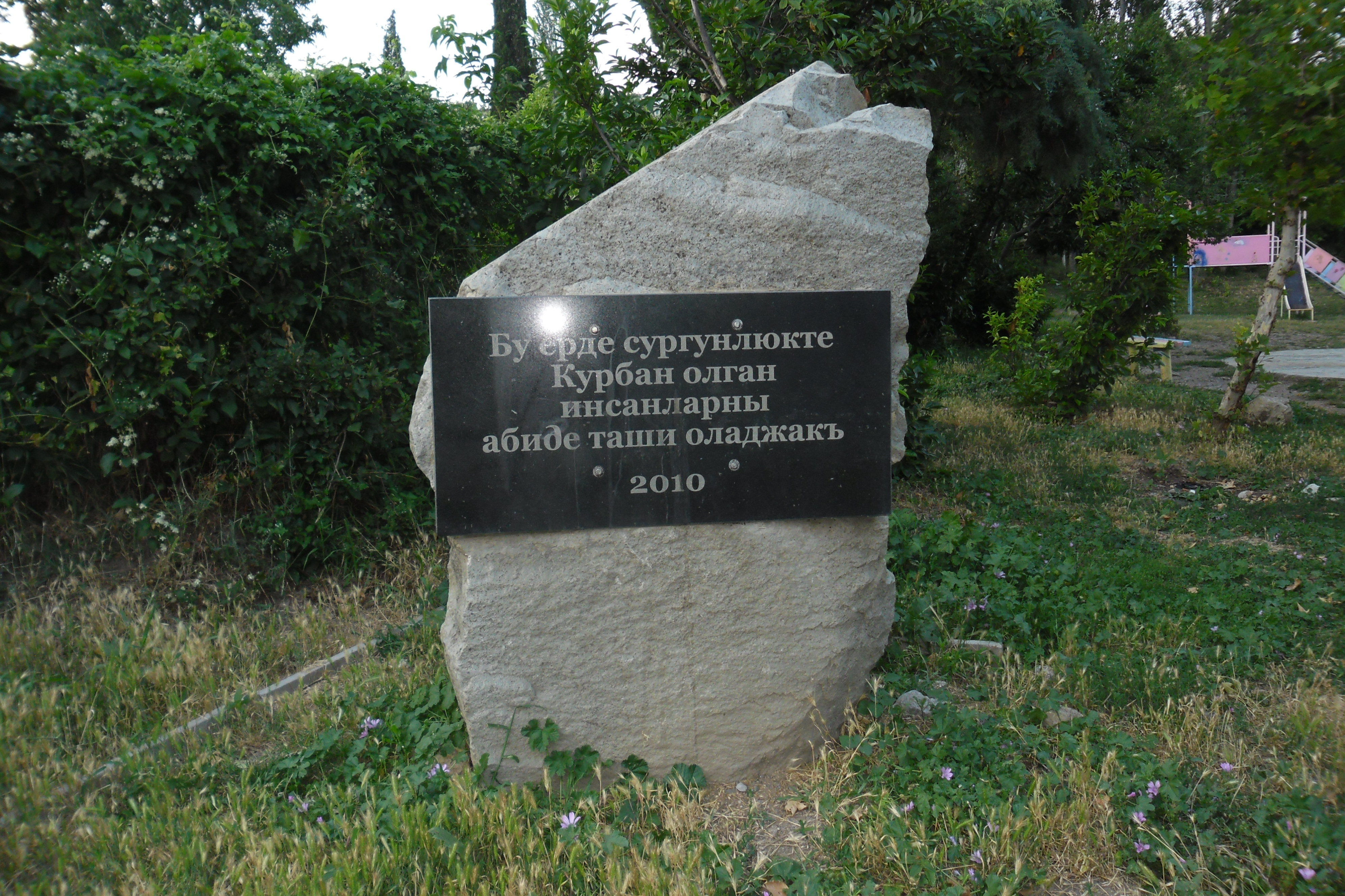 Генеральське